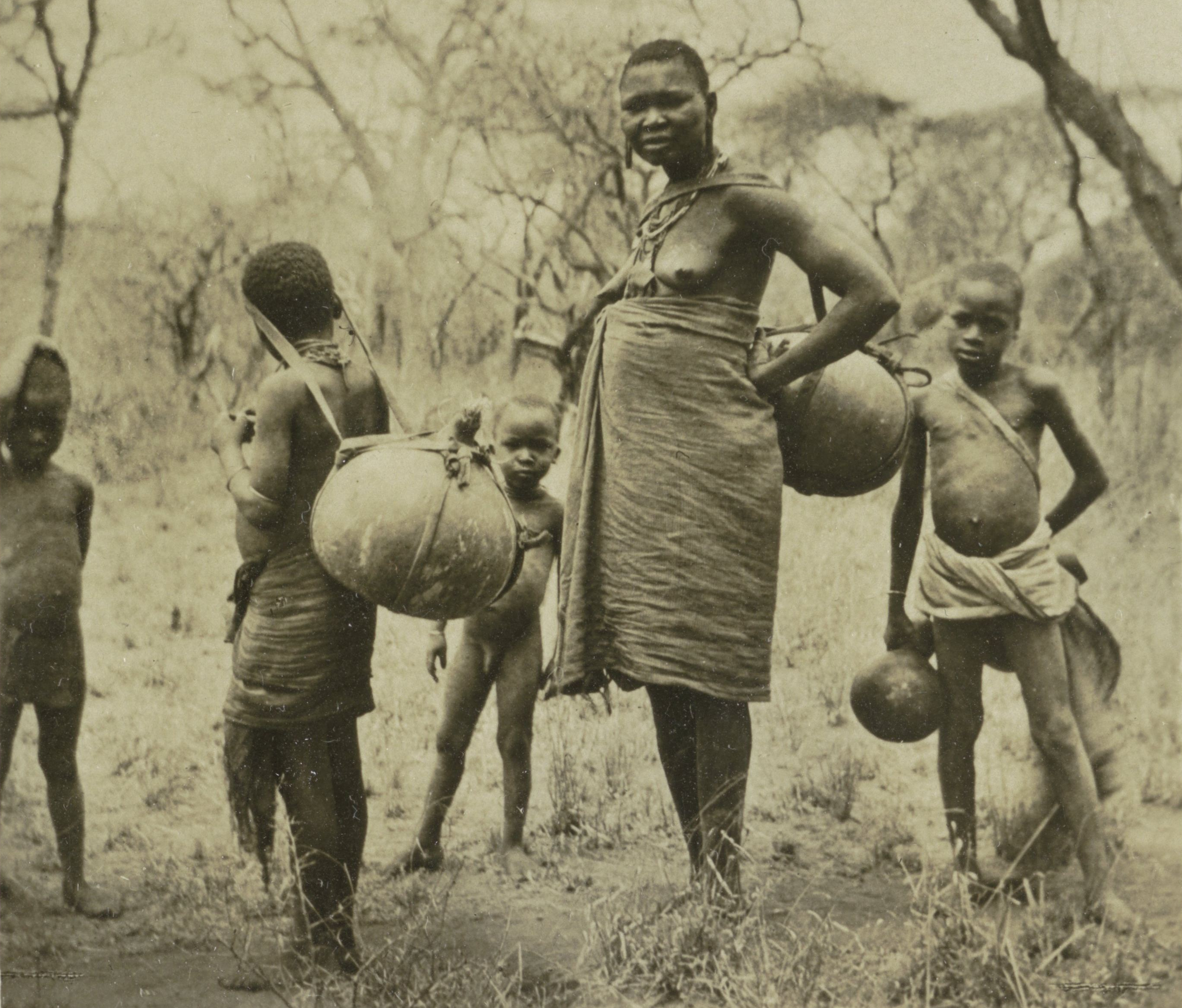 IdentificatieTitel(s): Een vrouw en kinderen van het Kambavolk halen waterKamba-Frau geht mit ihren Kindern Wasser holen (titel op object)Objecttype: stereofoto Objectnummer: RP-F-F12840Opschriften / Merken: nummer, recto, gedrukt: ‘S 6003’monogram, recto, afgedrukt: ‘NPG’VervaardigingVervaardiger: fotograaf: anoniemuitgever: Neue Photographische GesellschaftPlaats vervaardiging: fotograaf: Afrikauitgever: BerlijnDatering: 1898 - 1935Materiaal: fotopapier Techniek: ontwikkelgelatinezilverdrukAfmetingen: h 88 mm × b 180 mmOnderwerpWat: mother and child(ren), woman and child(ren) (family group)Verwerving en rechtenVerwerving: overdracht van beheer 1994Copyright: Publiek domein